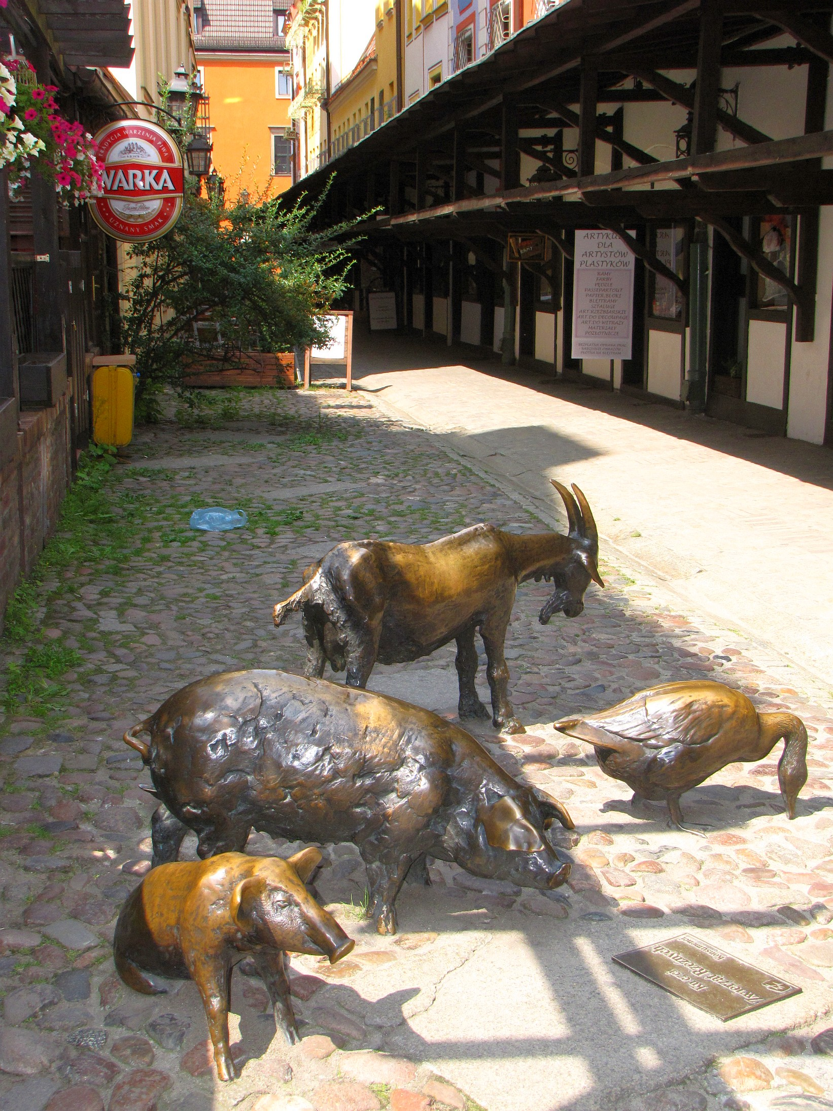 Denkmal der Schlachttiere, Große Fleischbänke, Wrocław (Breslau), Niederschlesien, Polen.